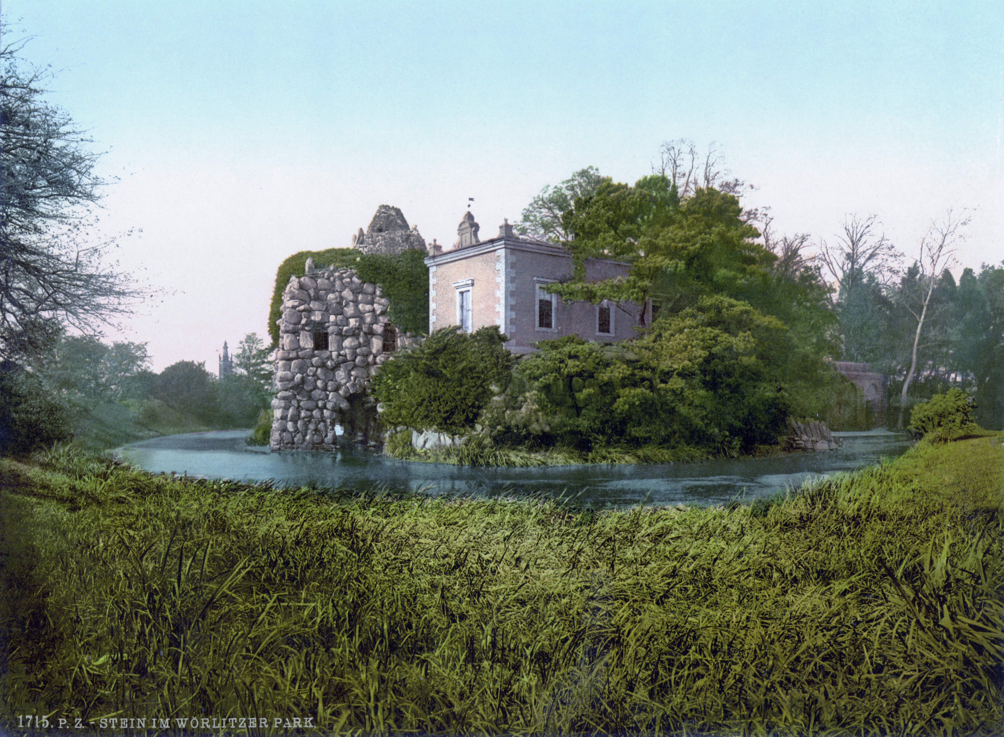 Stein Wörlitzer Park um 1900